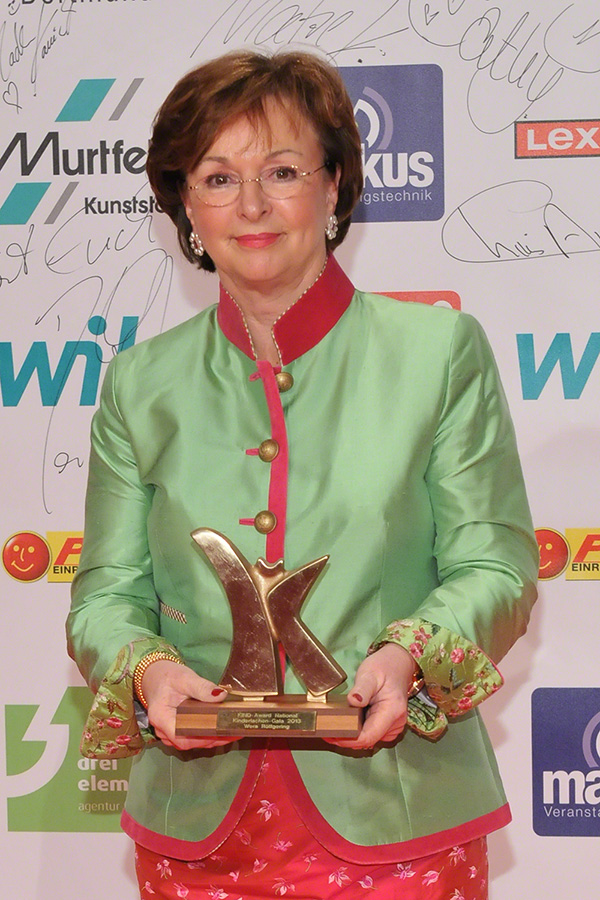 Wera Röttgering erhält den KIND-Award (Kategorie National) für die Gründung und den Vorsitz von Herzenswünsche e.V. Der Preis wurde am 7. Dezember 2013 in Dortmund vom Verein Kinderlachen vergeben.